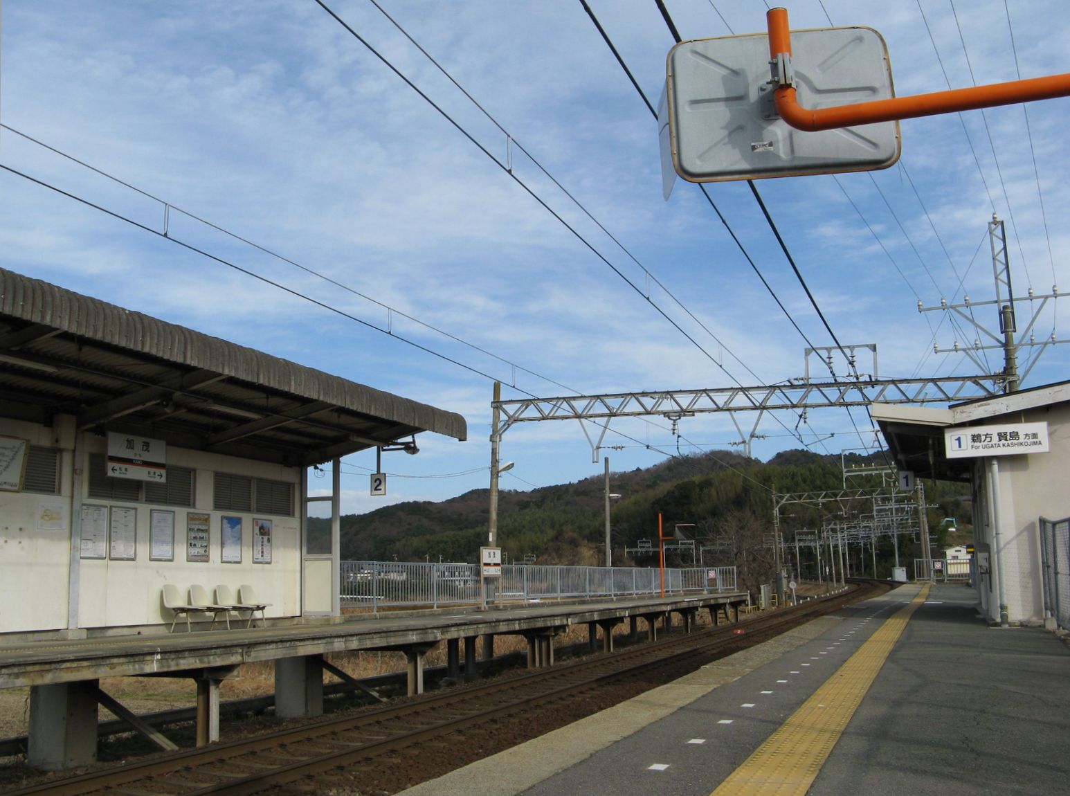 Kamo Station, Toba, Mie, Japan